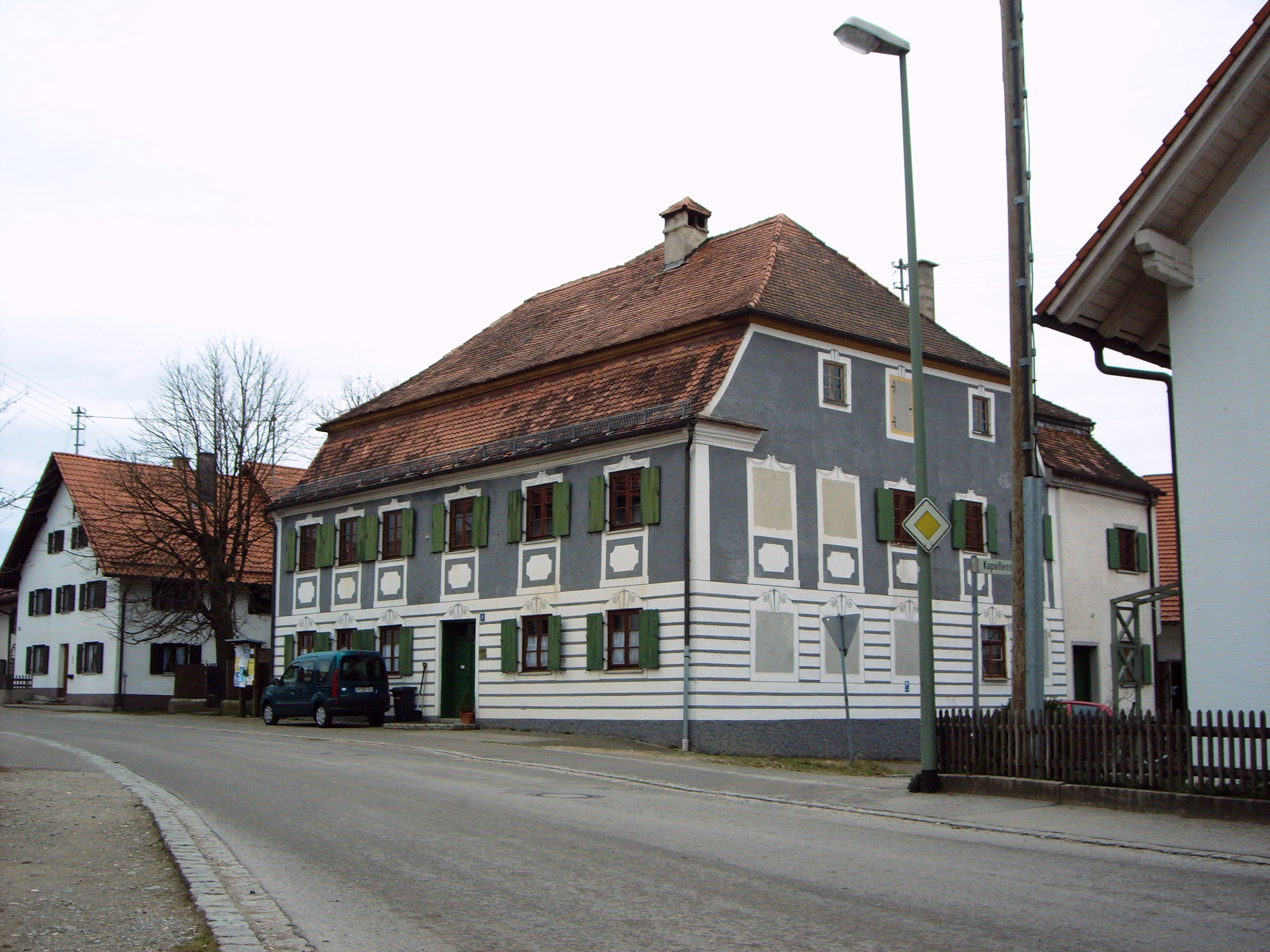 Haus in Ummendorf, Gemeinde Pürgen, Kreis Landsberg am Lech